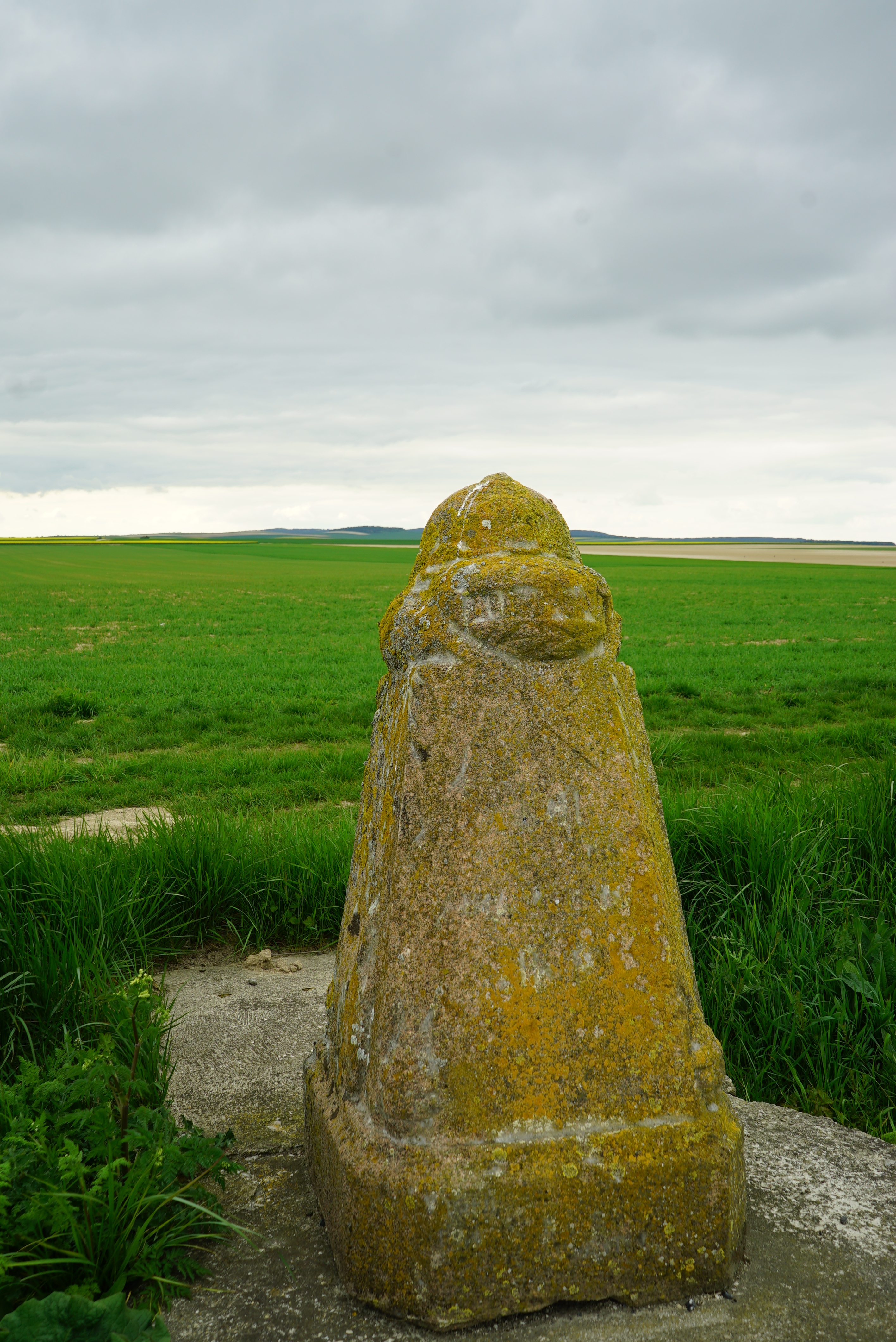 lors du "Centenaire de la bataille des monts de champagne".